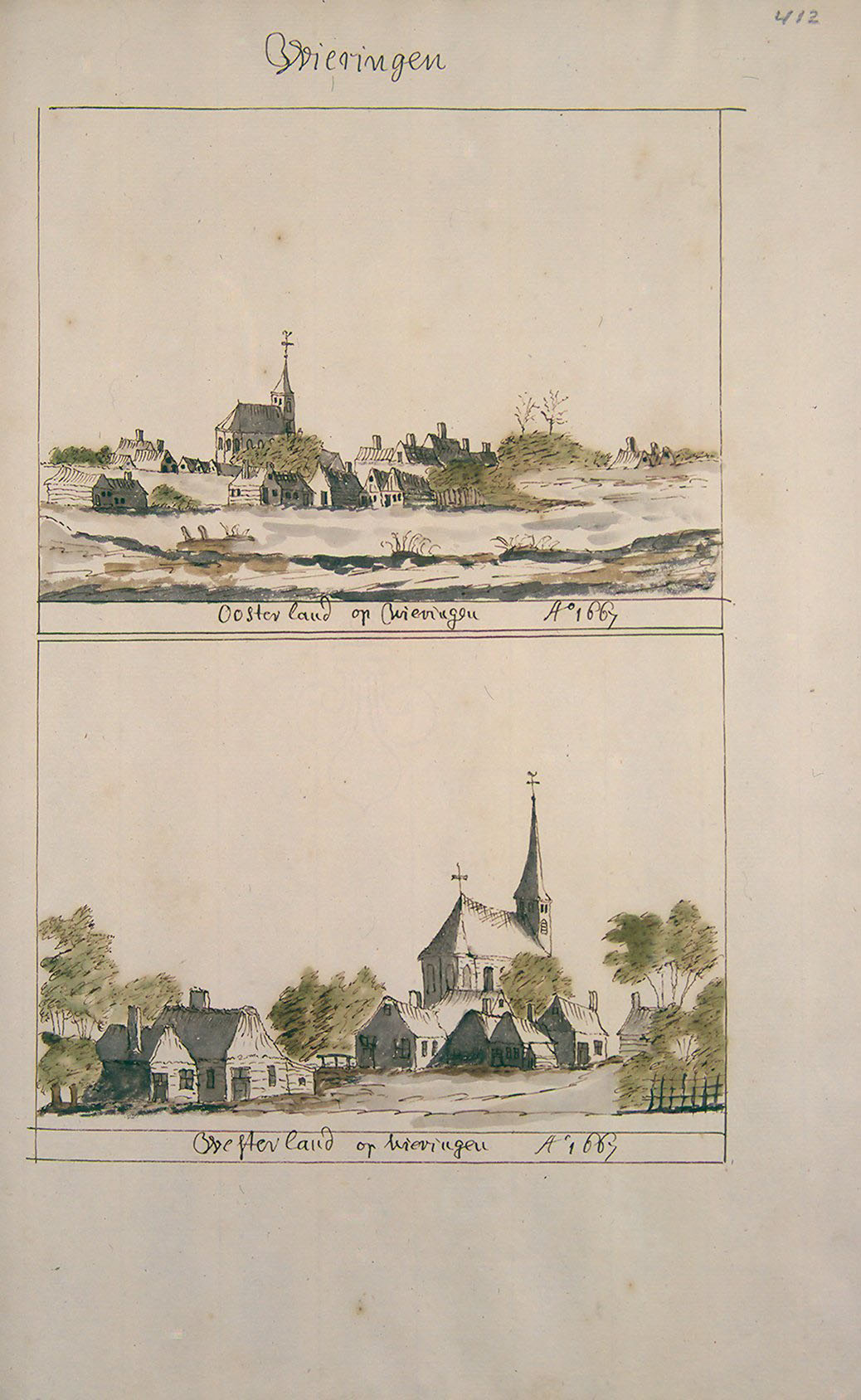 Beschrijving en Afbeelding der Steden, Dorpen, Gehugten Adelijke en andere Gebouwen in Westfriesland, Waterland, Kennermerland, en Aankleve van Dien, Dus beschreven en bij een Versamelt, Mitsgaders, in Alphabetise Ordre Geschikt door Andries Schoemaker